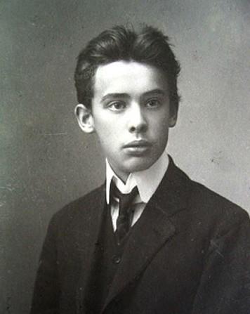 Jan Scheinost (1896 - 1964), Český novinář a politik.